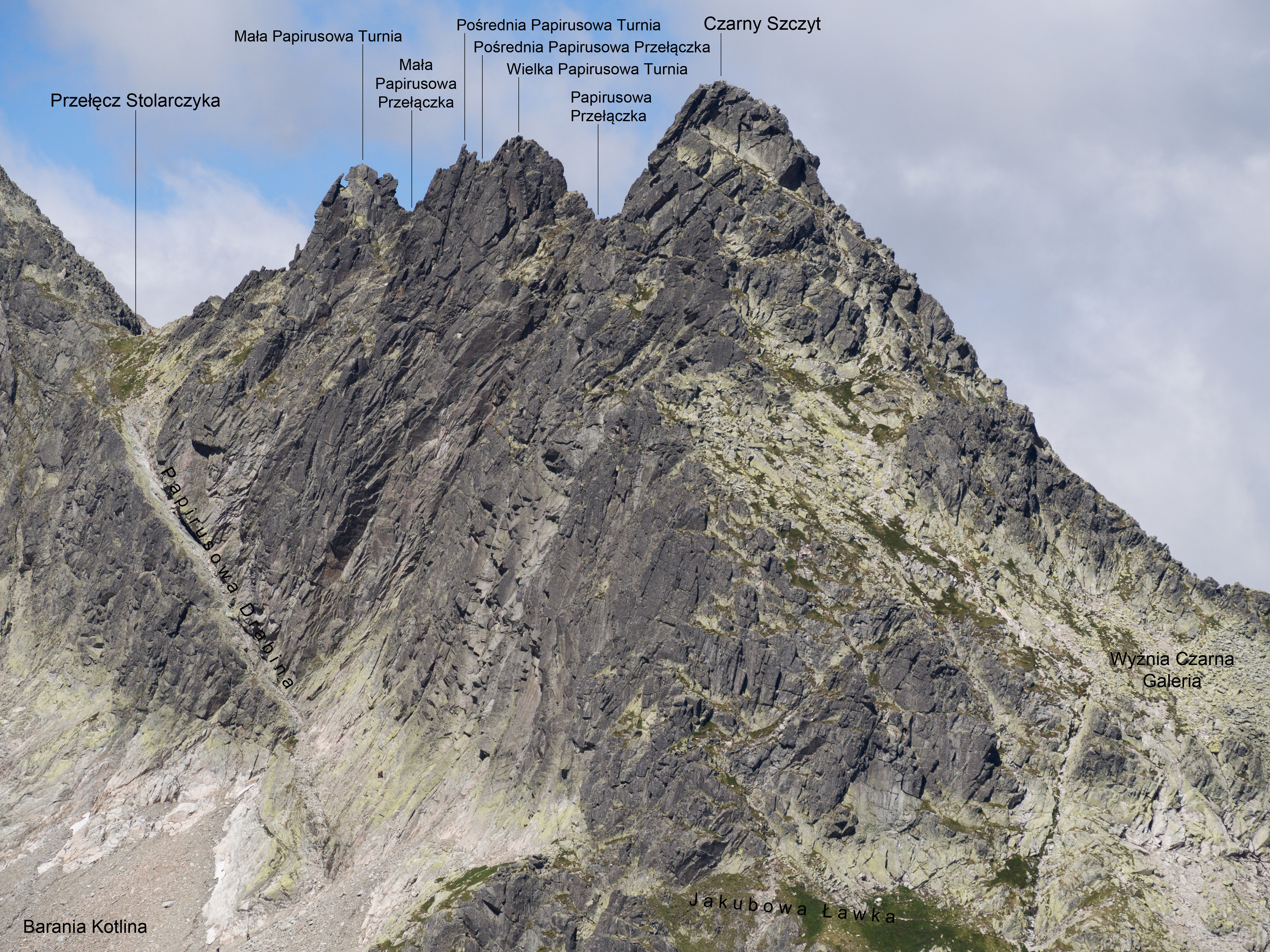 Przełęcz Stolarczyka, Papirusowe Turnie i Czarny Szczyt – widok z Miedzianej Baszty.